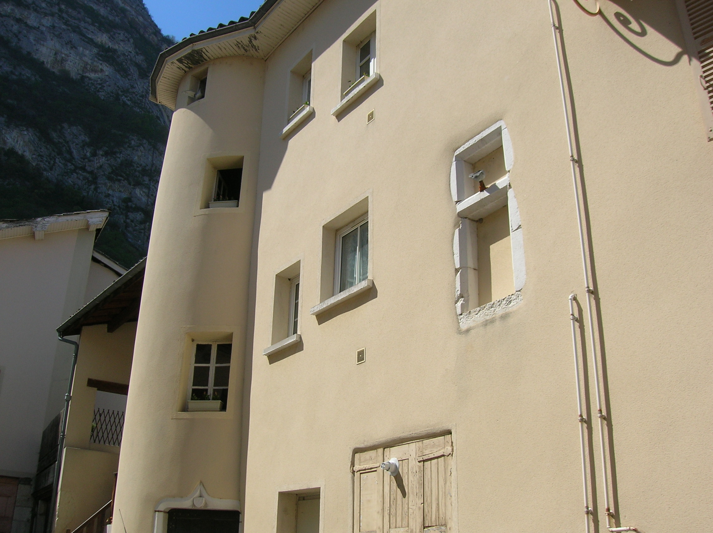 Sassenage